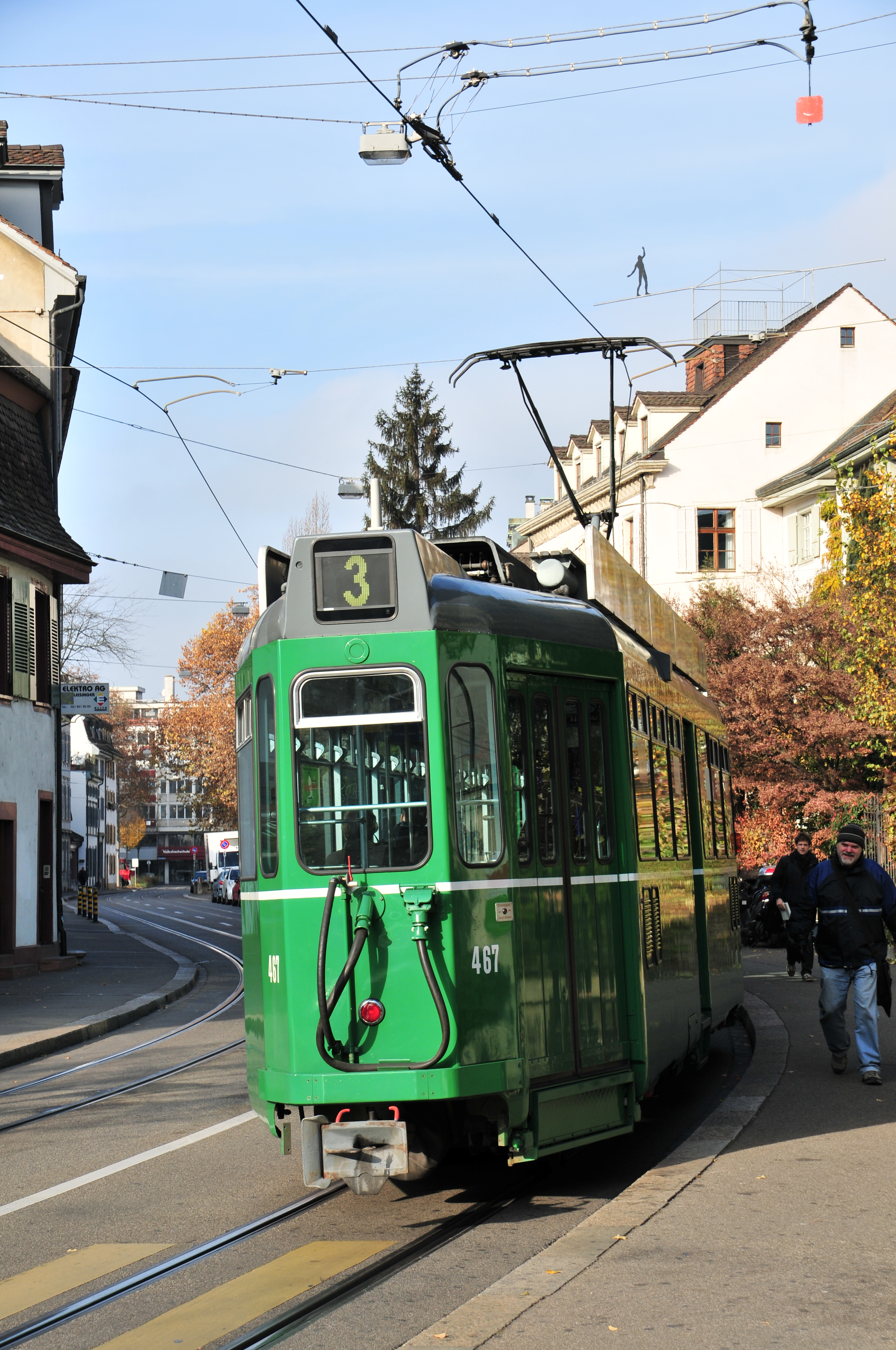 Basel